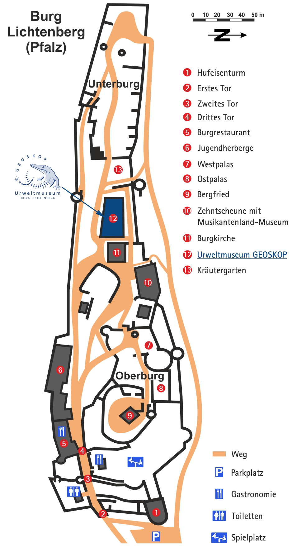 Burgplan von Burg Lichtenberg (Pfalz9 mit Lage des GEOSKOP